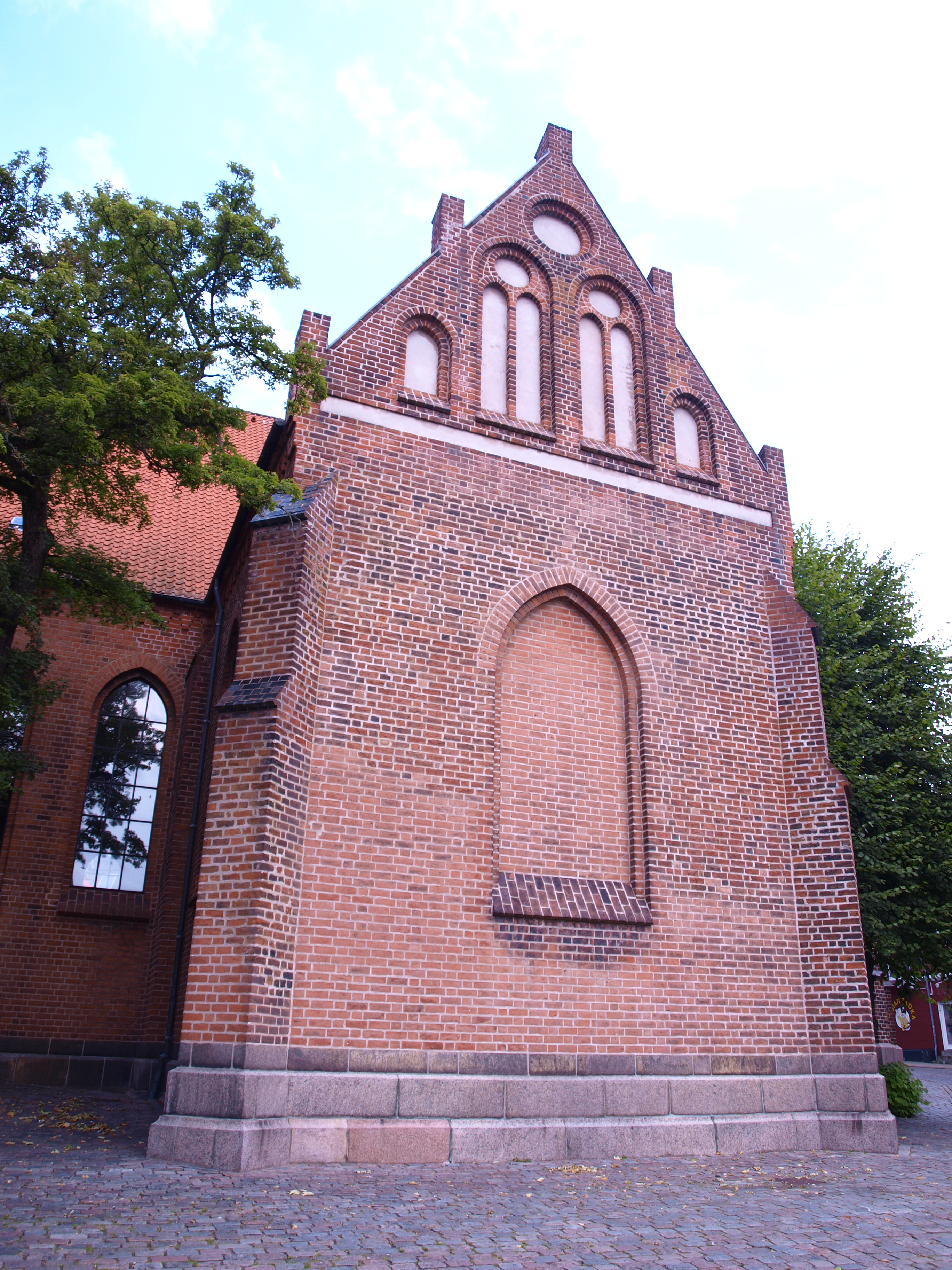 Søndre korsarm udvendigt - Sankt Nikolai Kirke (Kolding)